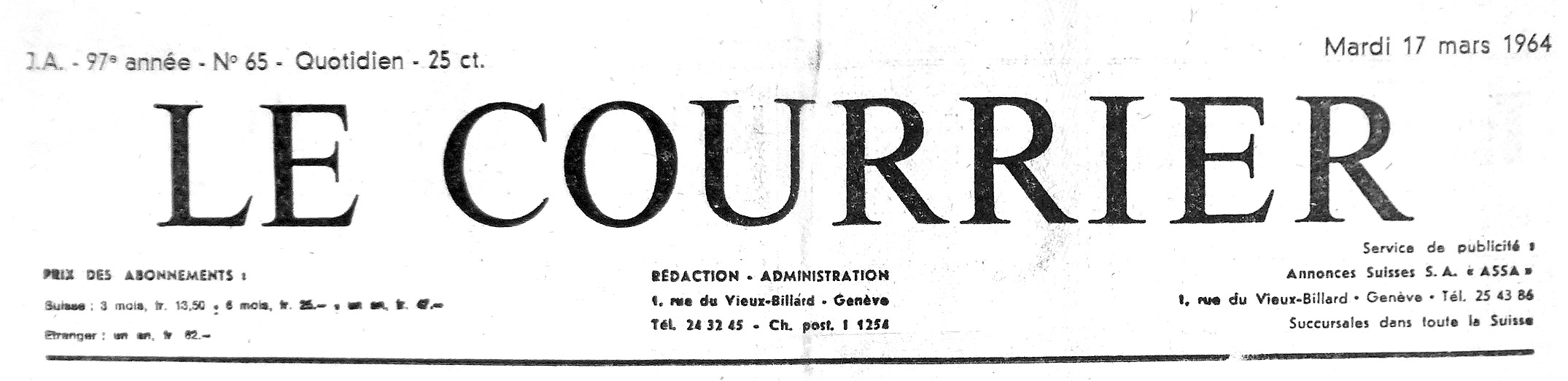 Haut de la première page du quotidien genevois Le Courrier du 17 mars 1964.